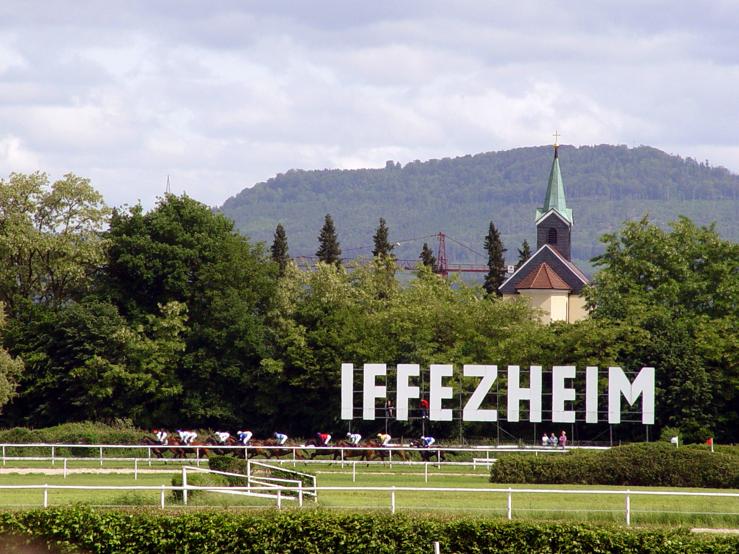 Rennen auf der Galopprennbahn Iffezheim. Das Feld befindet sich vor der Iffezheimer Friedhofskapelle. Der Berg im Hintergrund ist der Battert.